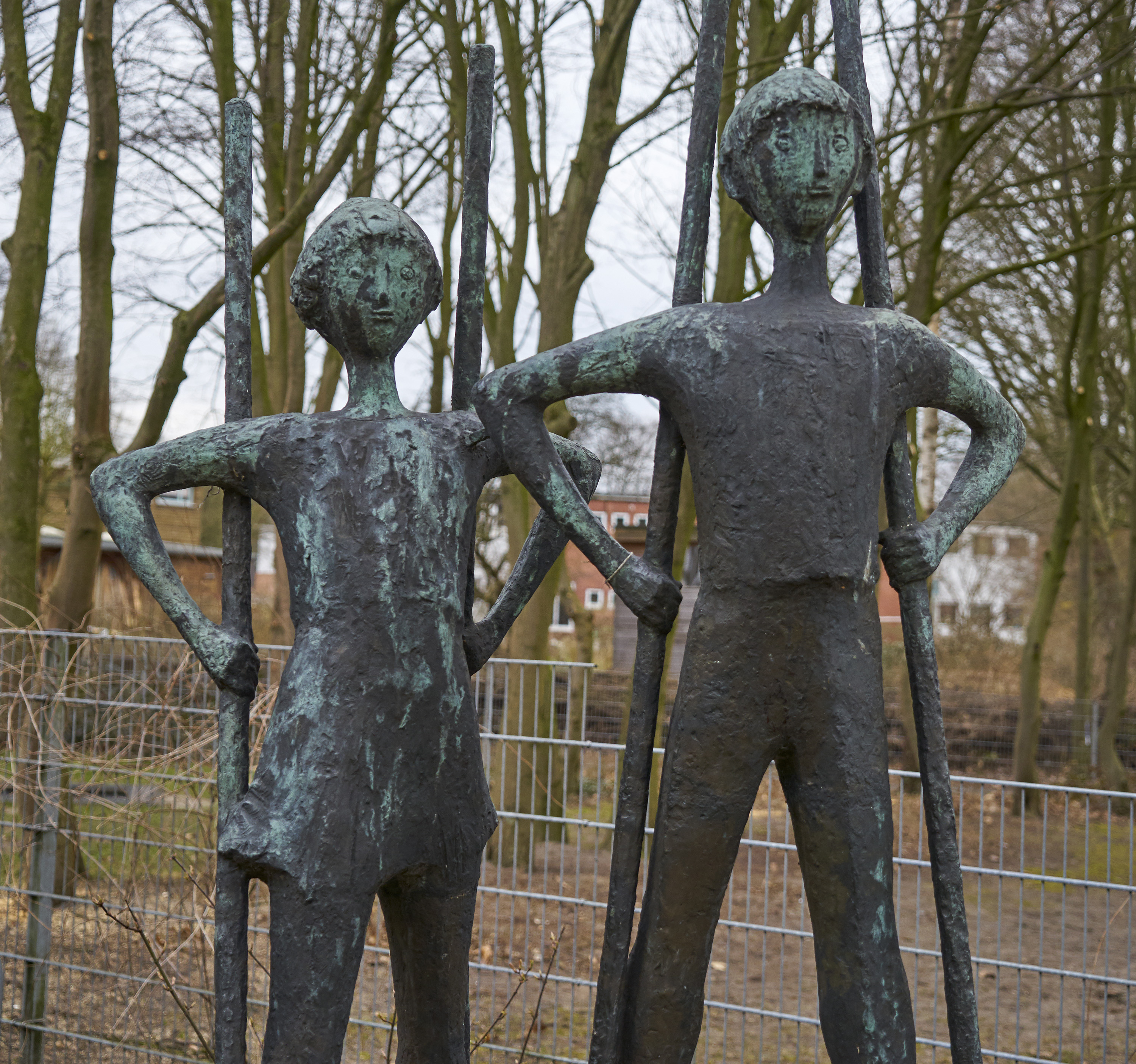 Walter Wadephul „Kinder auf Stelzen“ 1965, Bremen k: Kunst im öffentlichen Raum